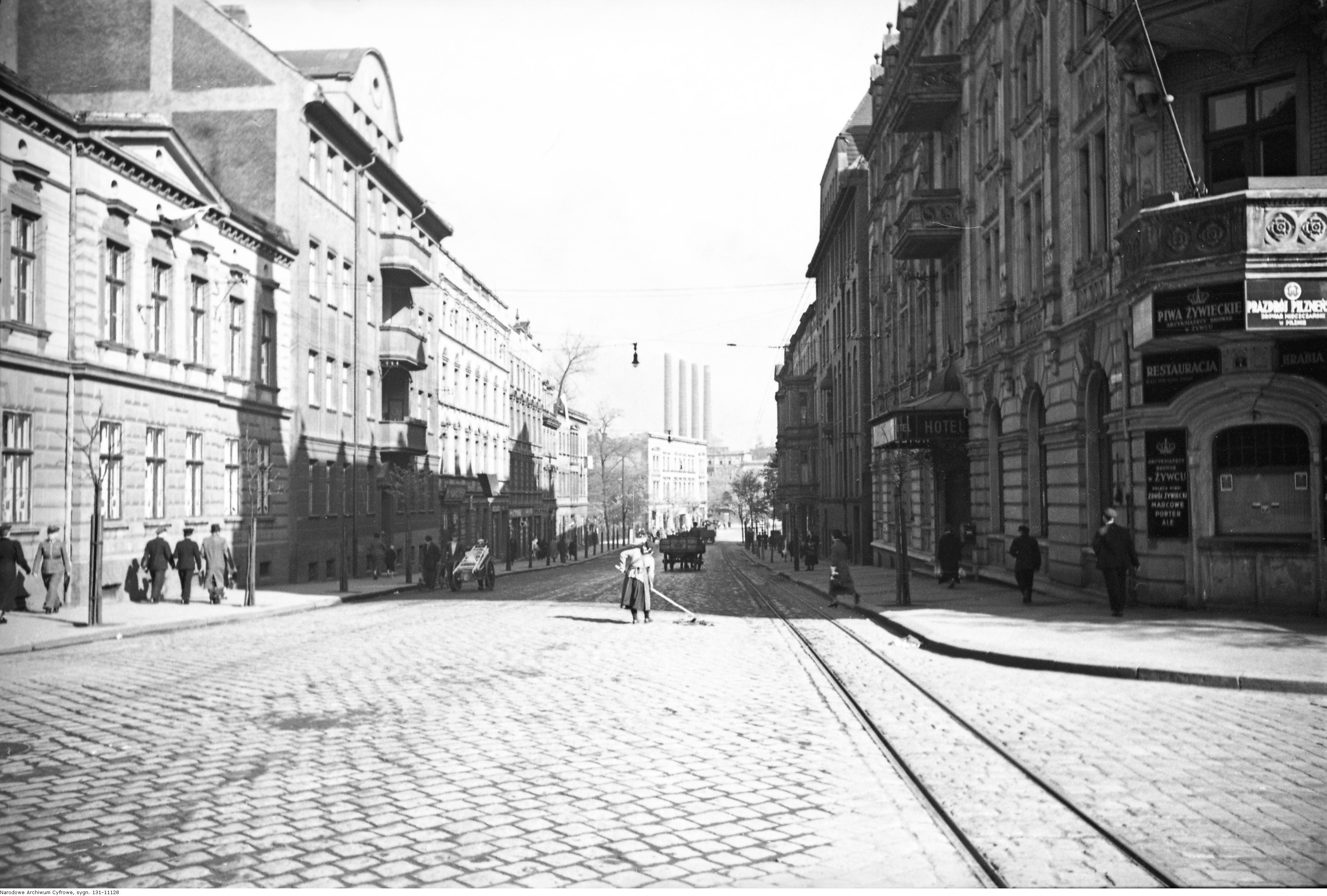 Wjazd do miasta na Katowice.